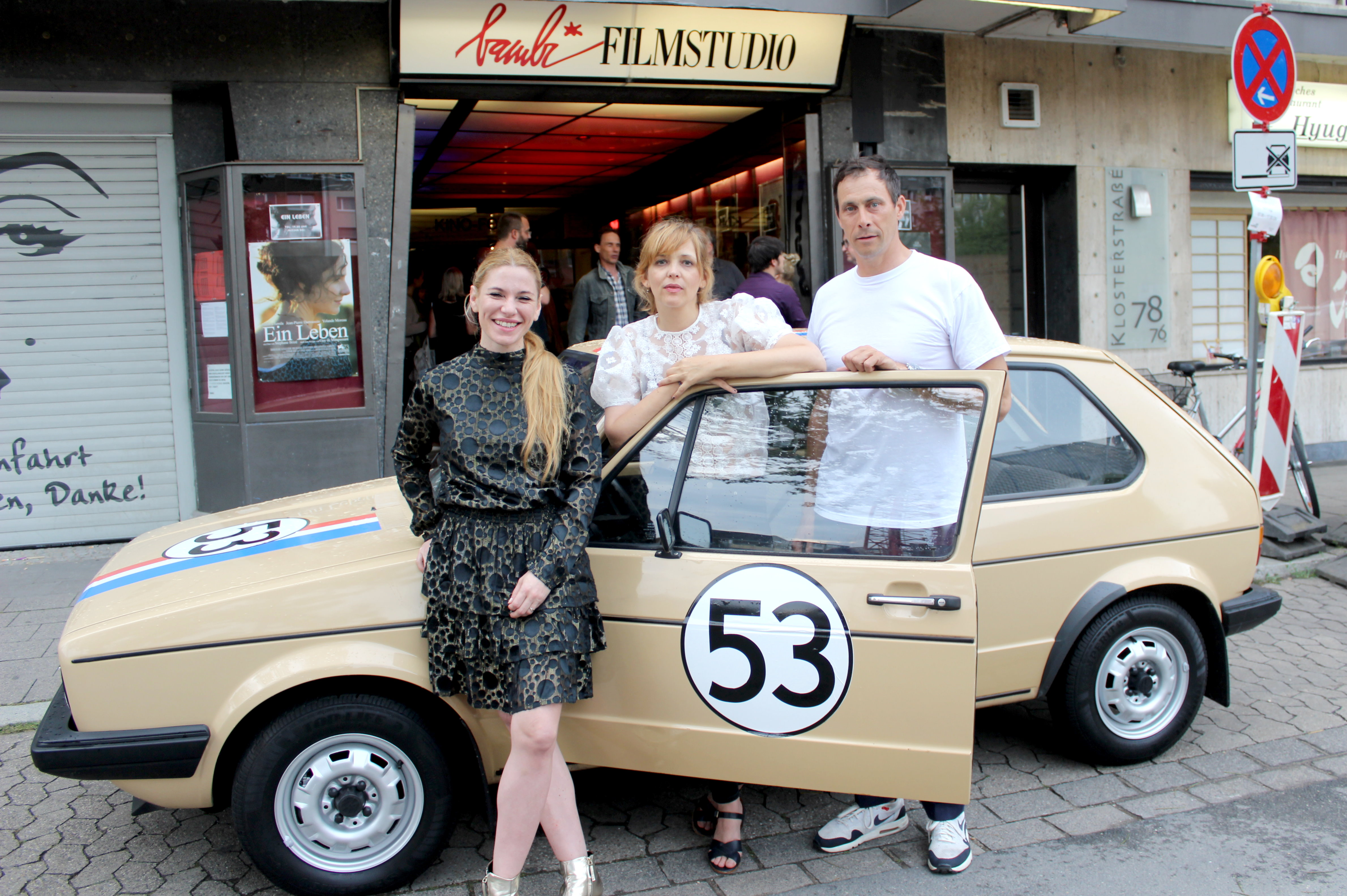 40211 Düsseldorf, Klosterstraße 78. Bambi Filmstudio. Am Dienstag, den 29.5.2018 wurde im Filmkunstkino Bambi in Düsseldorf die NRW-Premiere des neuen Films von der Regisseurin Laura Lackmann "ZWEI IM FALSCHEN FILM" gefeiert. Aufnahme von 2018.